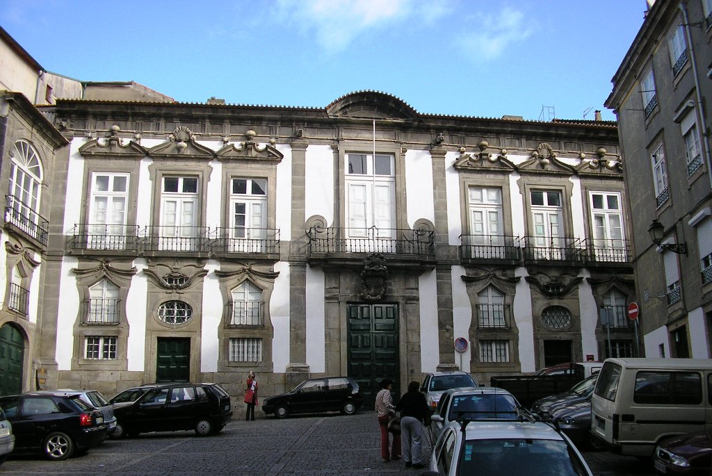 The barroque "São João Novo" palace in Porto, Portugal.